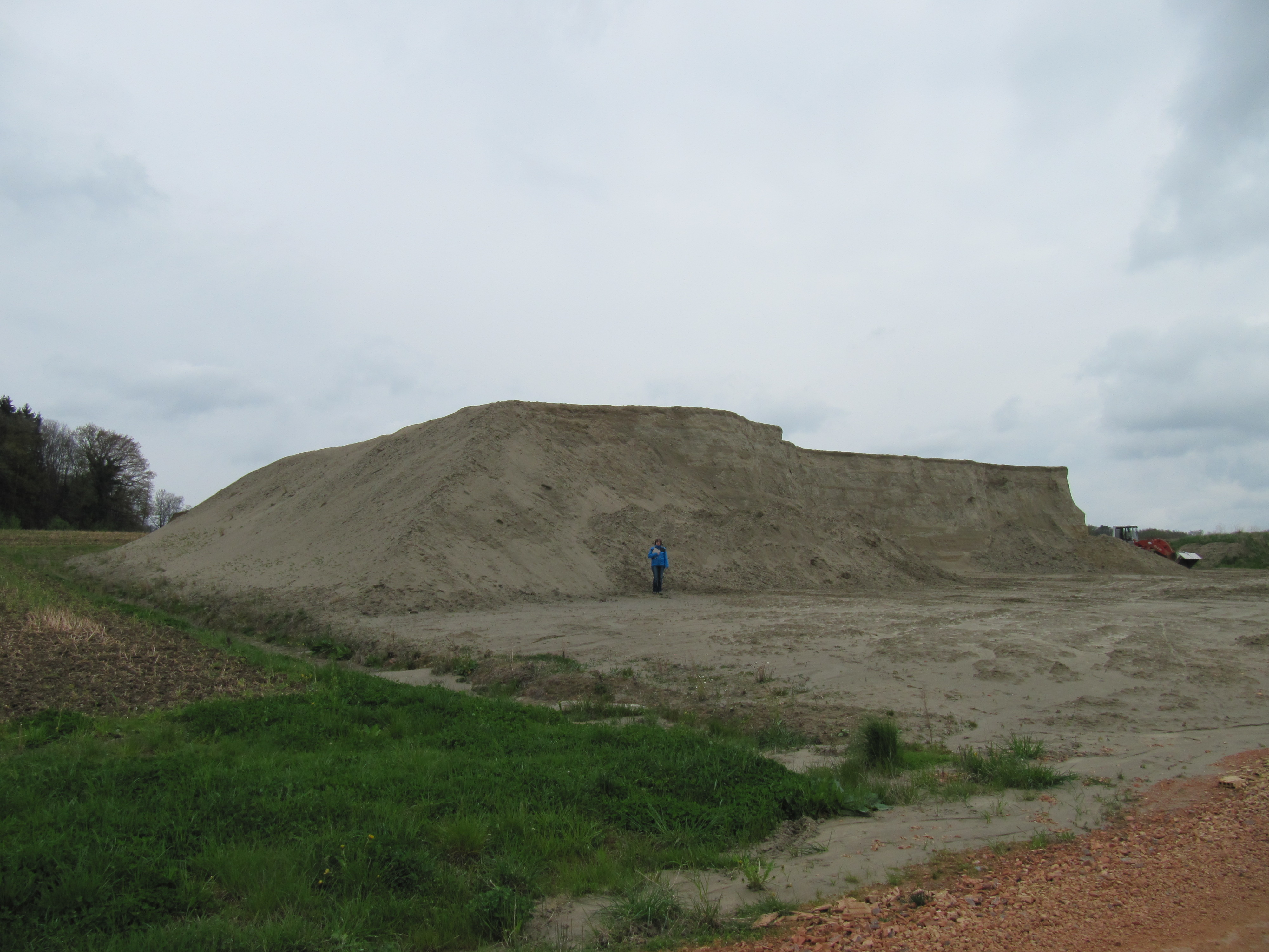 Der Glimmersand wird für die Ziegelproduktion aus den Sandgruben abgetragen.